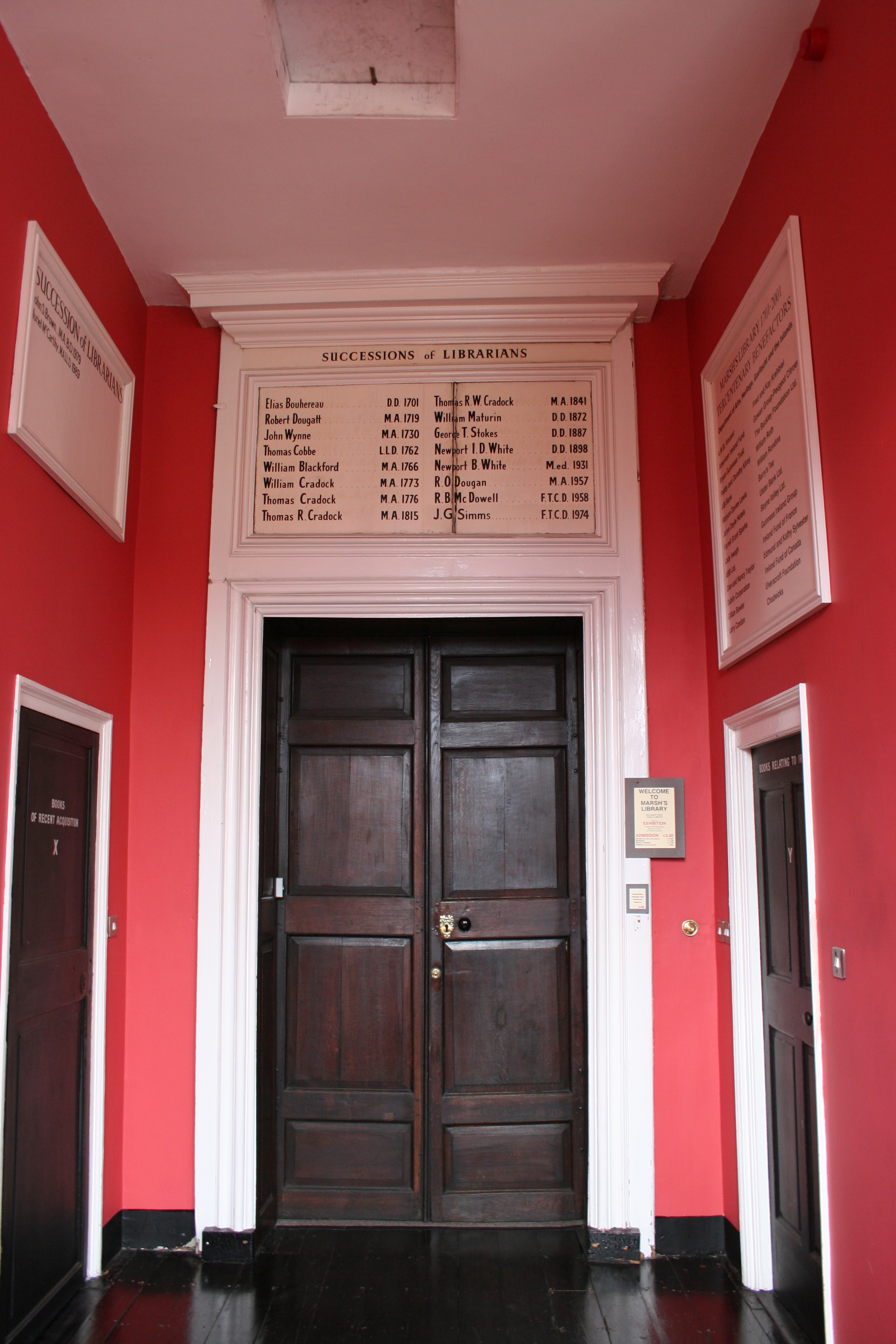 La biblioteca pública más antigua de Irlanda